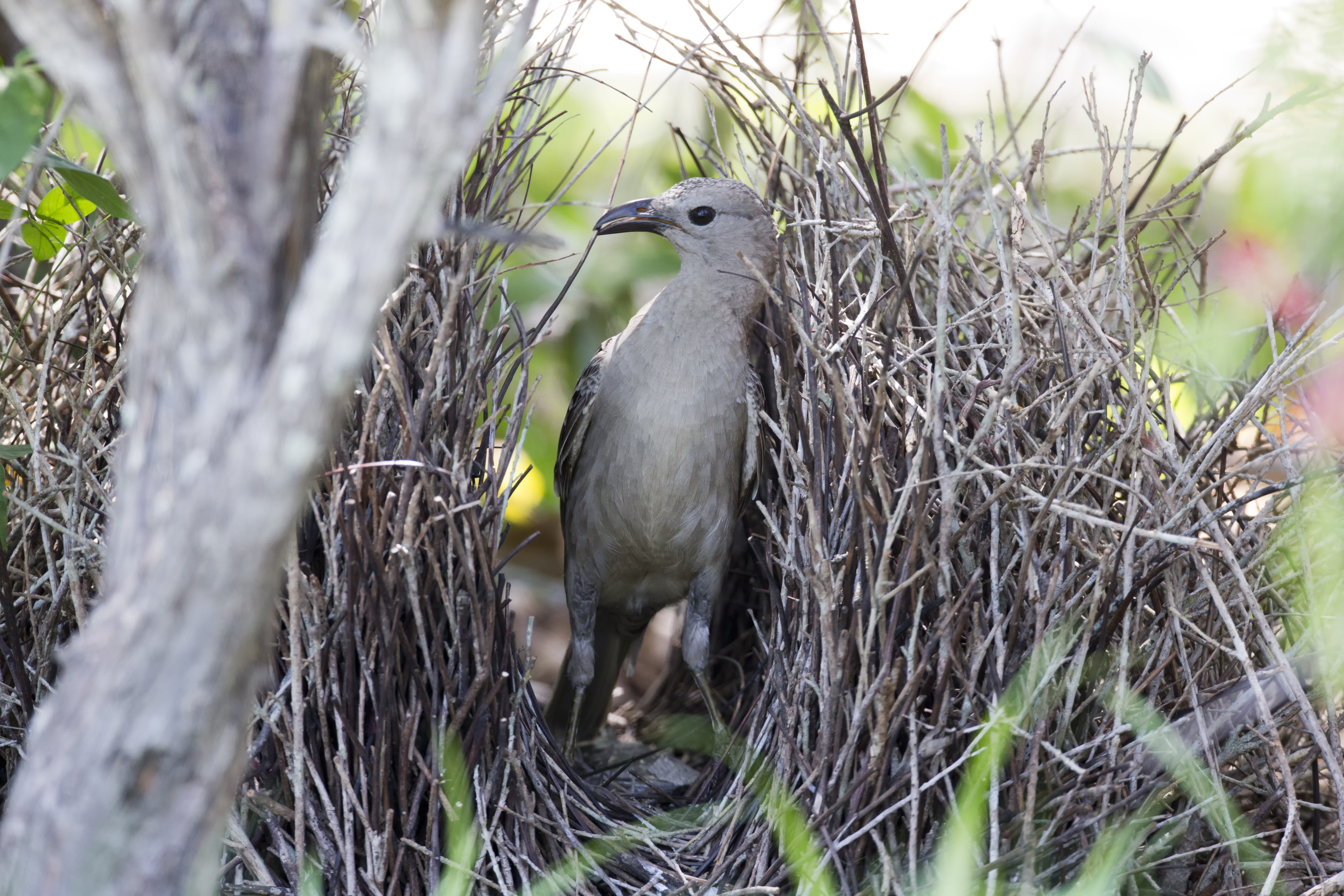 running repairs